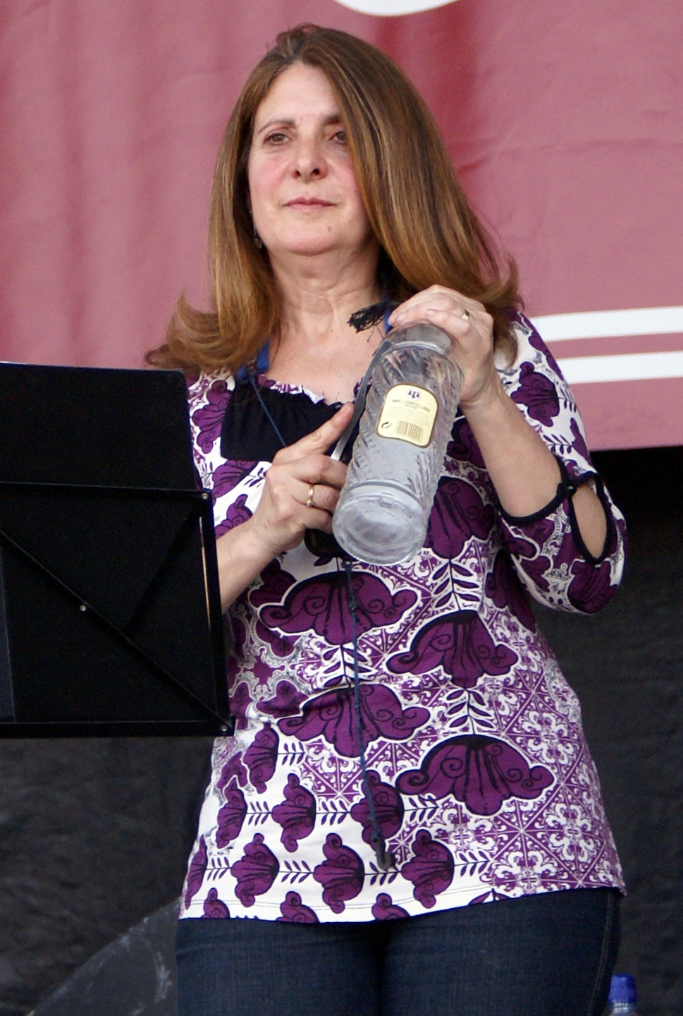 Llanos Monreal, de Nuevo Mester de Juglaría, tocando la botella de anís durante el concierto celebrado en Villalar de los Comuneros el 23 de abril de 2009.